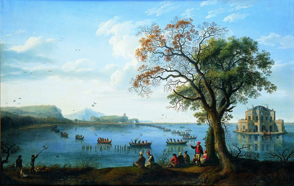 Jakob Philipp Hackert - Lago Fusaro con Casina Vanvitelliana. Il re Ferdinando IV di Borbone a caccia di folaghe. (Museo di Capodimonte, Napoli, Sala 43).